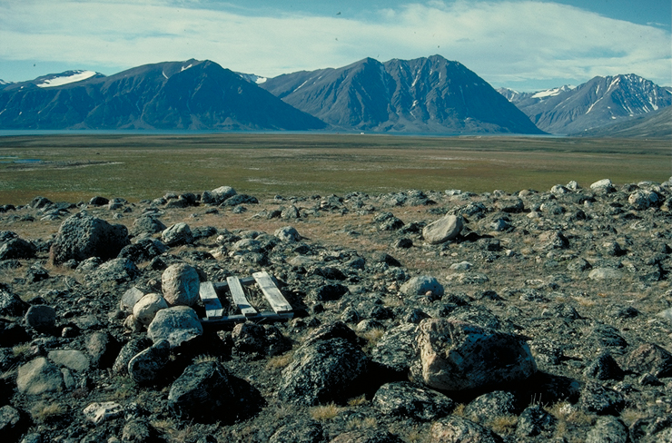 Landskab med Zackenberg stationen i baggrunden t.h, Greenland National Park